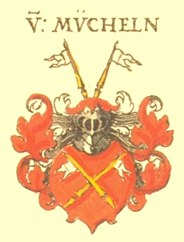 Wappen der Meißner Adelsfamilie Mücheln